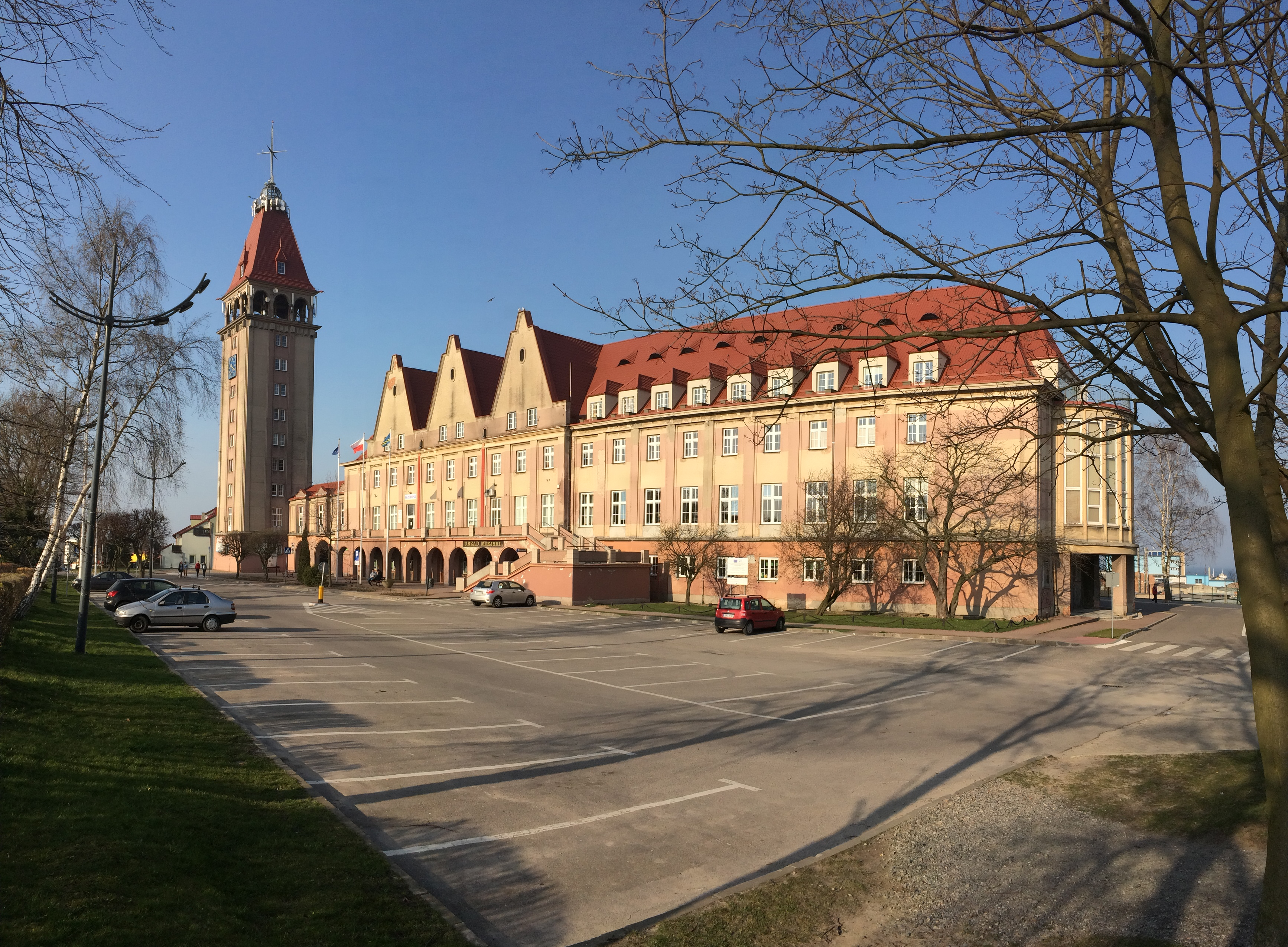 Fisherman's House in Wladyslawowo Poland